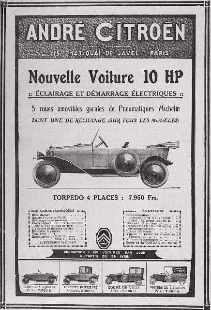 Publicité Citroën de 1919, pour la 10HP type A de série (premier véhicule automobile à la chaîne en France)